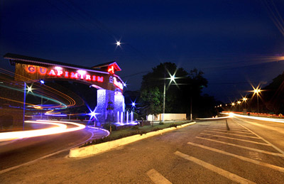 Portal de Guapimirim - BR-116